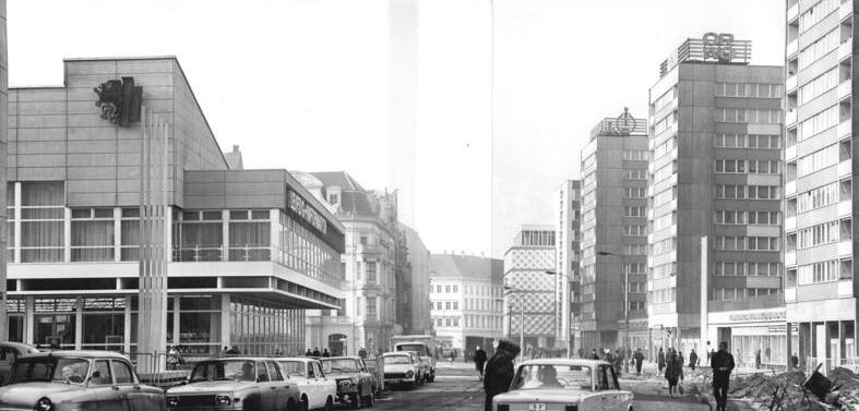 Leipzig, Stadtzentrum, Am Brühl Zentralbild Gahlbeck 2-2-1970 Leipzig: Stadtzentrum-Repräsentativ zeigt sich der weltbekannte Brühl der Messestadt. Moderne Wohnbauten, Läden, kulturelle und soziale Einrichtungen, das Konsument-Warenhaus (r) und das neue Gebäude der Leipziger-Information (l) bestimmen das Weichbild der Stadt.